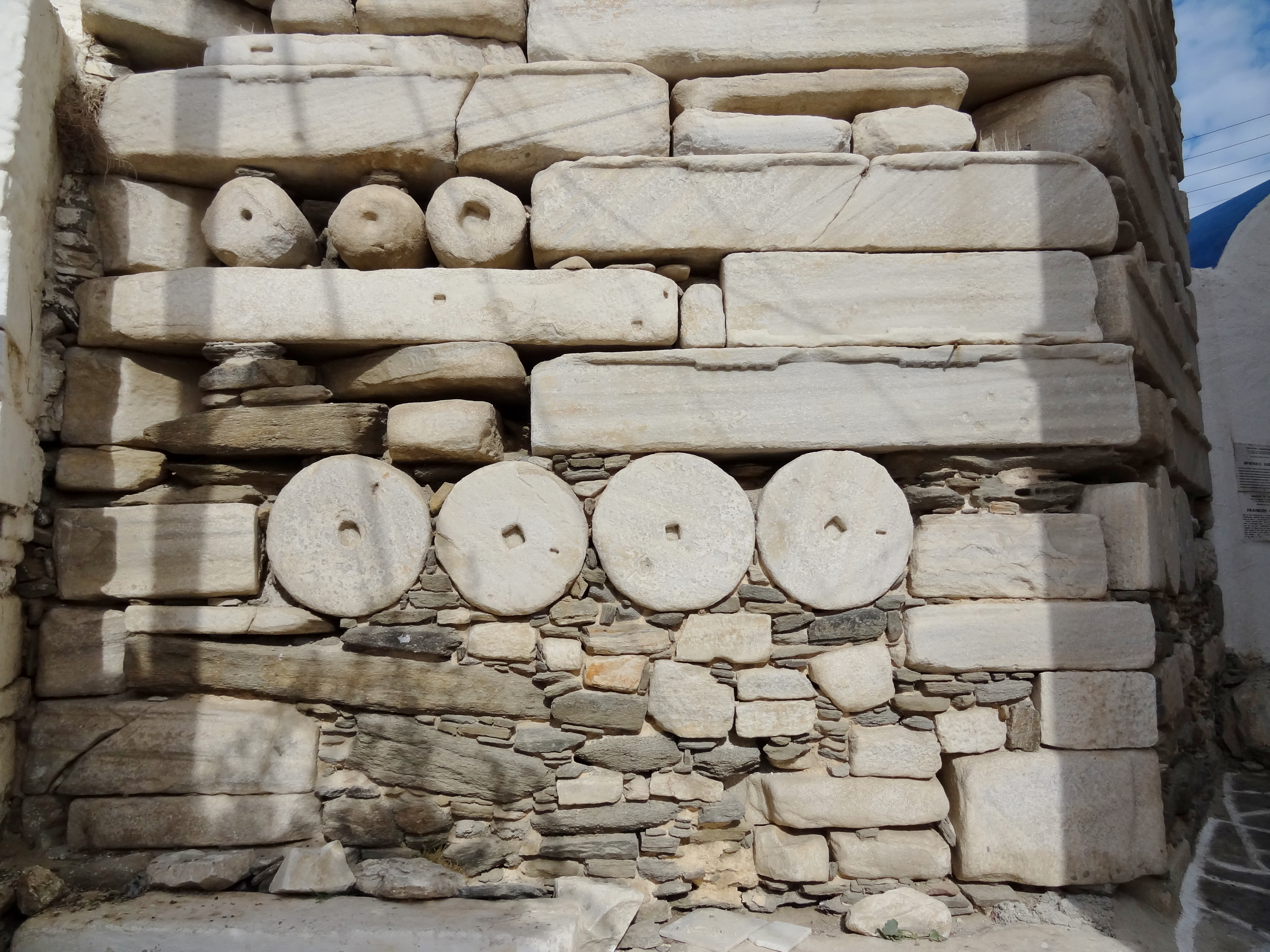 Venezianischen Festung (Φράγκικο Κάστρο) im Zentrum von Parikia auf Paros, Kykladen, Griechenland